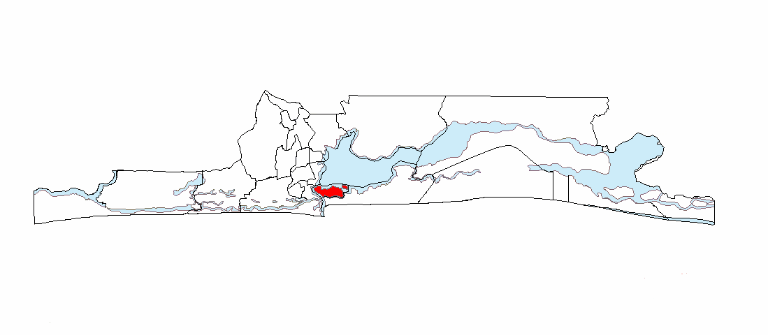 Localización de la Isla de Lagos en el Estado de Lagos